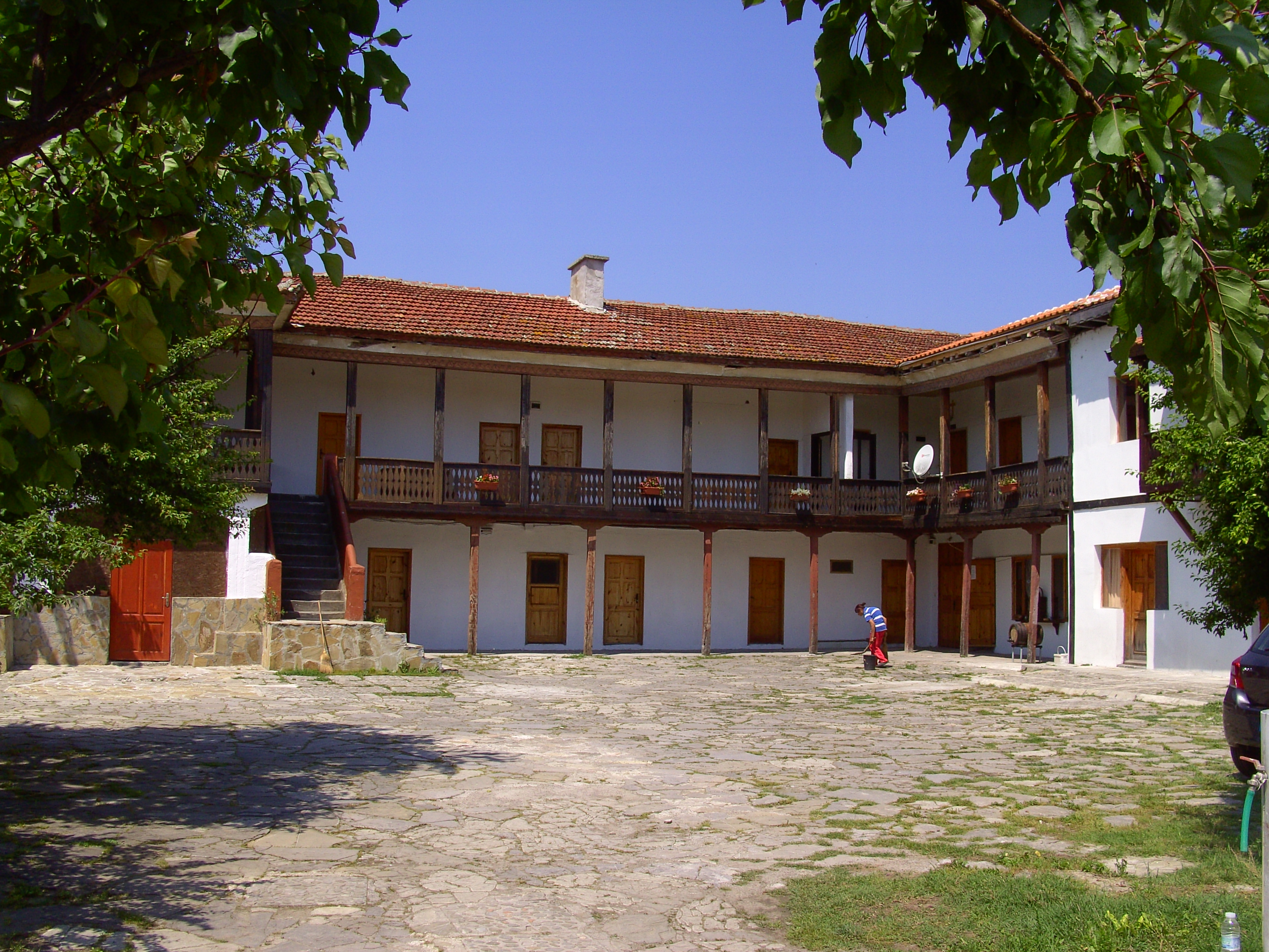 Hof des Klosters zum Heiligen Georg in Pomorie